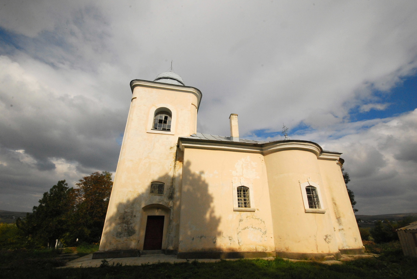 Biserica „Sf. Spiridon”